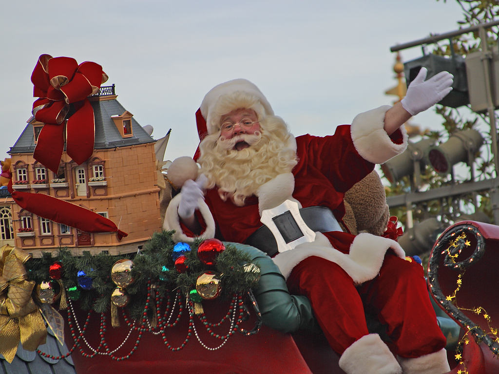 Święty Mikołaj podczas parady Disneya.